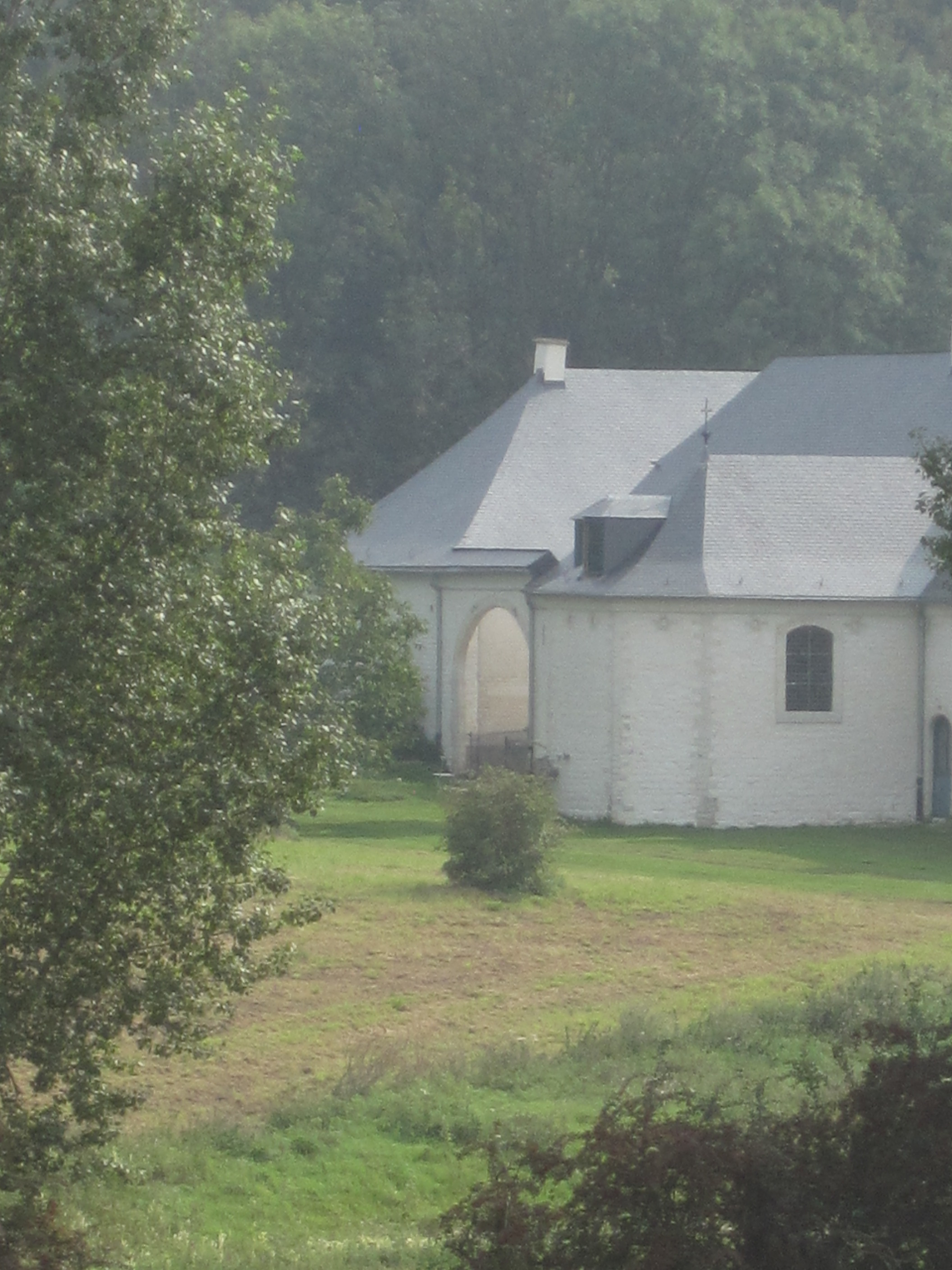 Les façades et toitures de tous les bâtiment de la ferme de Wahenges ainsi que le pavé de la cour, la charpente de la grange, la structure et charpente de la remise, les voûtes et la charpente du corps de logis, la L'église et son autel annexée au logis ainsi que le papier peint couvrant les murs de la deuxième pièce à droite de l'entrée du corps de logis #M#.